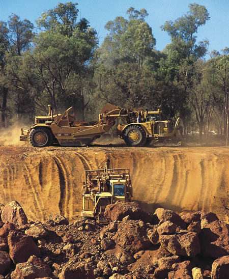 bauxietmijn Suriname, bauxiet wordt gewonnen in de dagbouw.